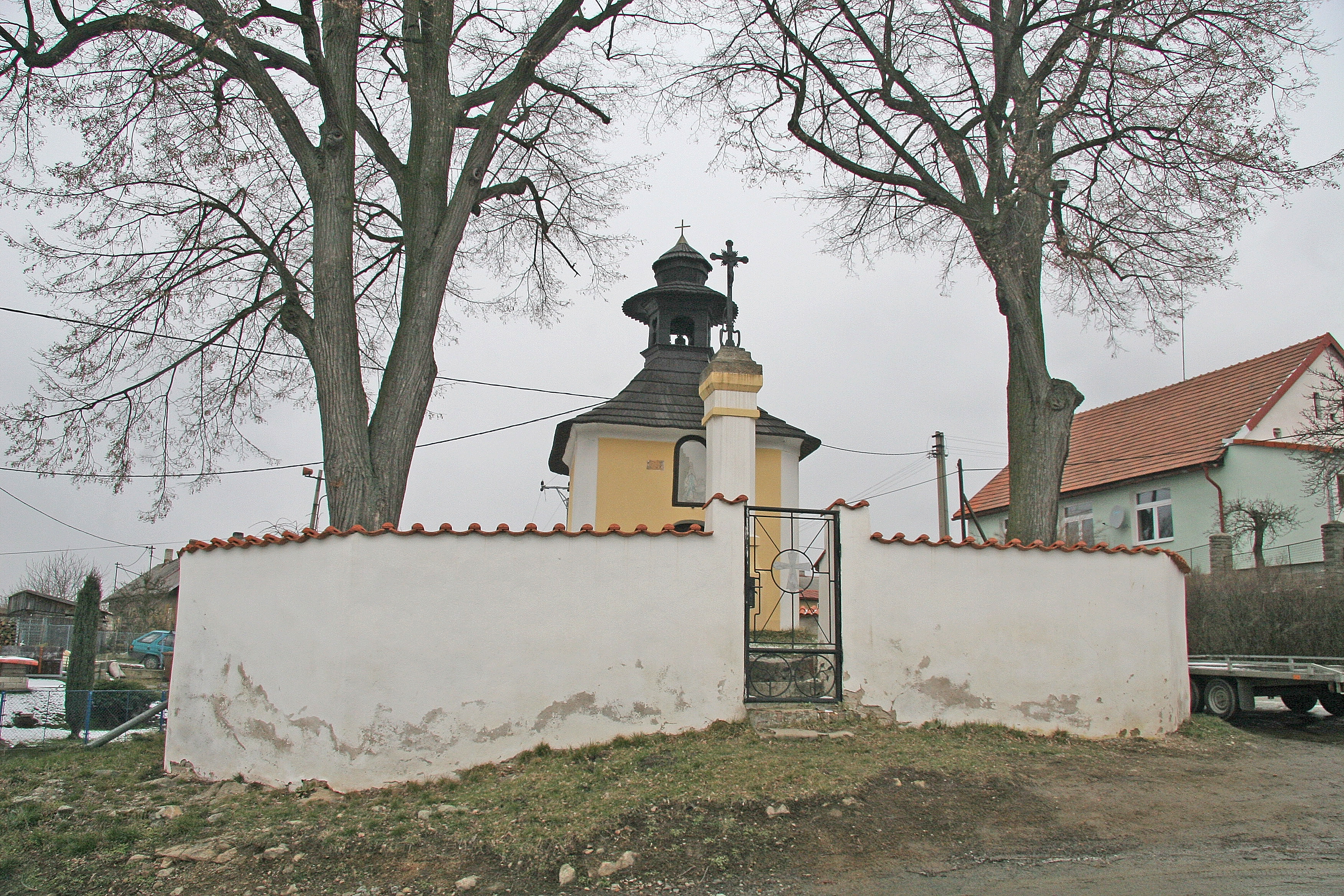 Kaple P. Marie (Struhařov), Struhařov